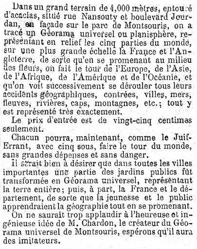 Le Petit Journal parle ici, dans la rubrique Les travaux de Paris page 3, 2ème colonne, du Géorama universel de Montsouris créé par M. Chardon. Références Gallica